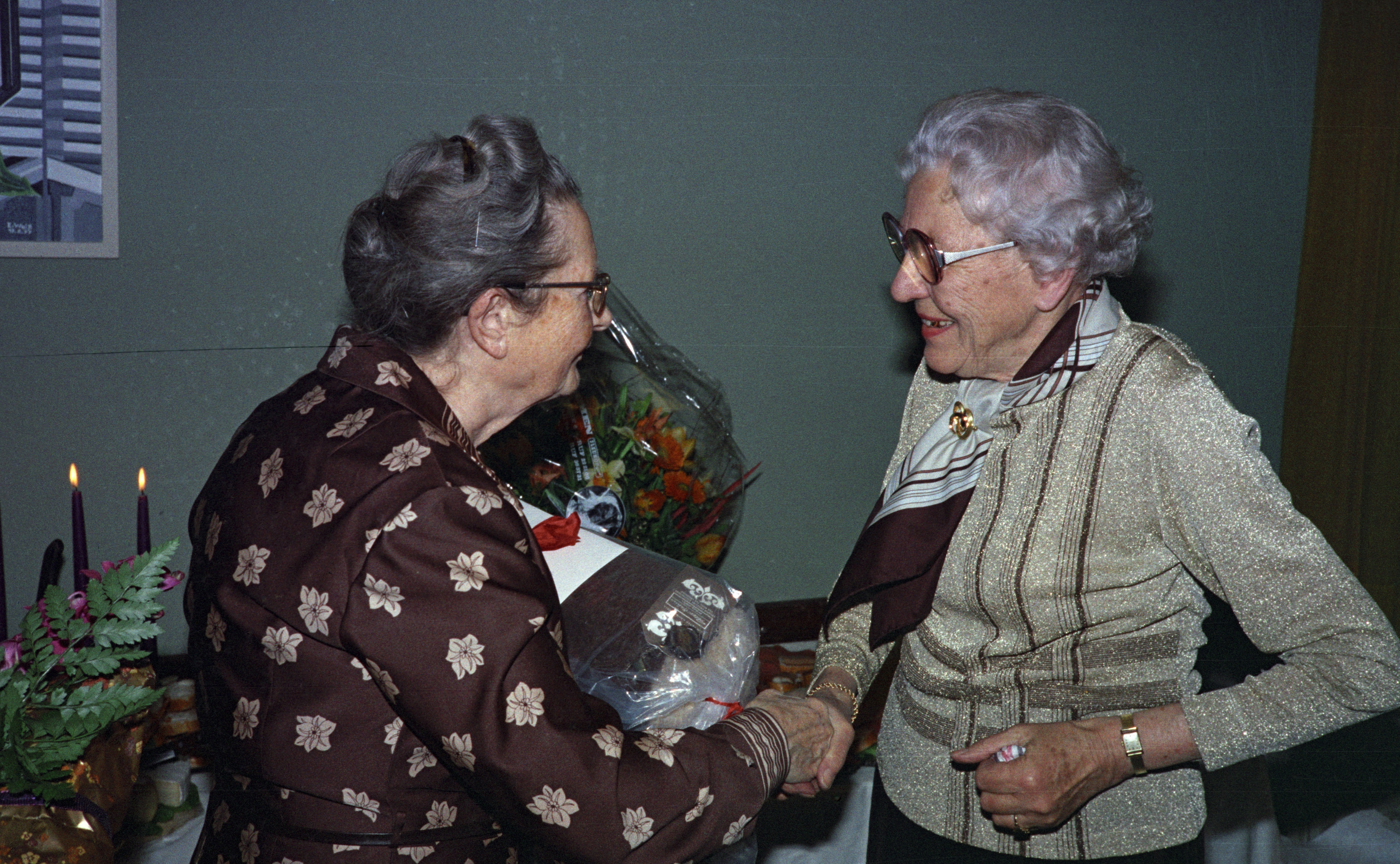 Die ehemalige Hamburger Bürgerschaftsabgeordnete Louise Hövermann (links) gratuliert der SPD-Funktionärin Gretl Markert zum 80. Geburtstag in der Altentagesstätte der AWO Averhoffstraße in Hamburg-Uhlenhorst.